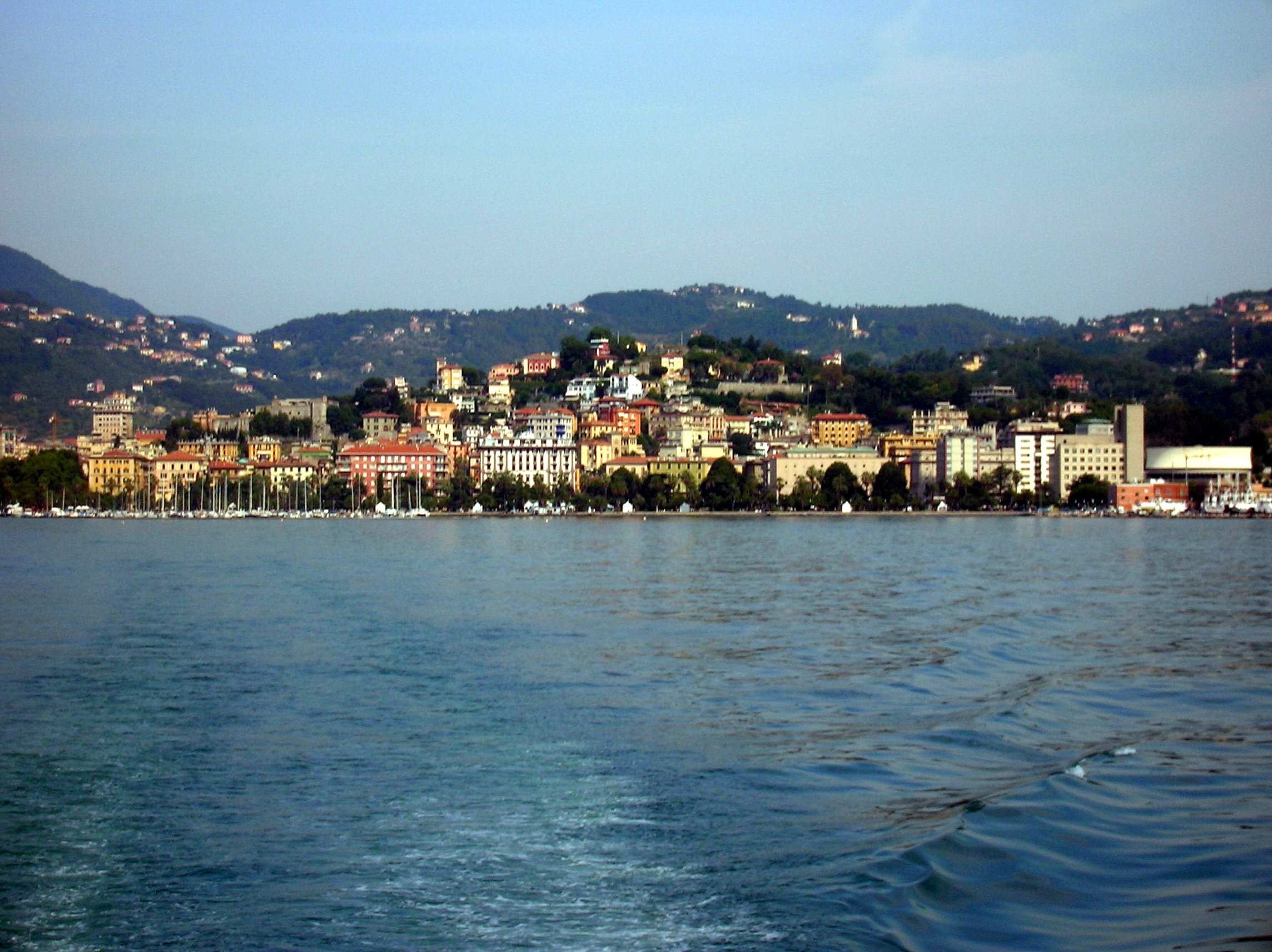 View, La Spezia, Liguria, Italia